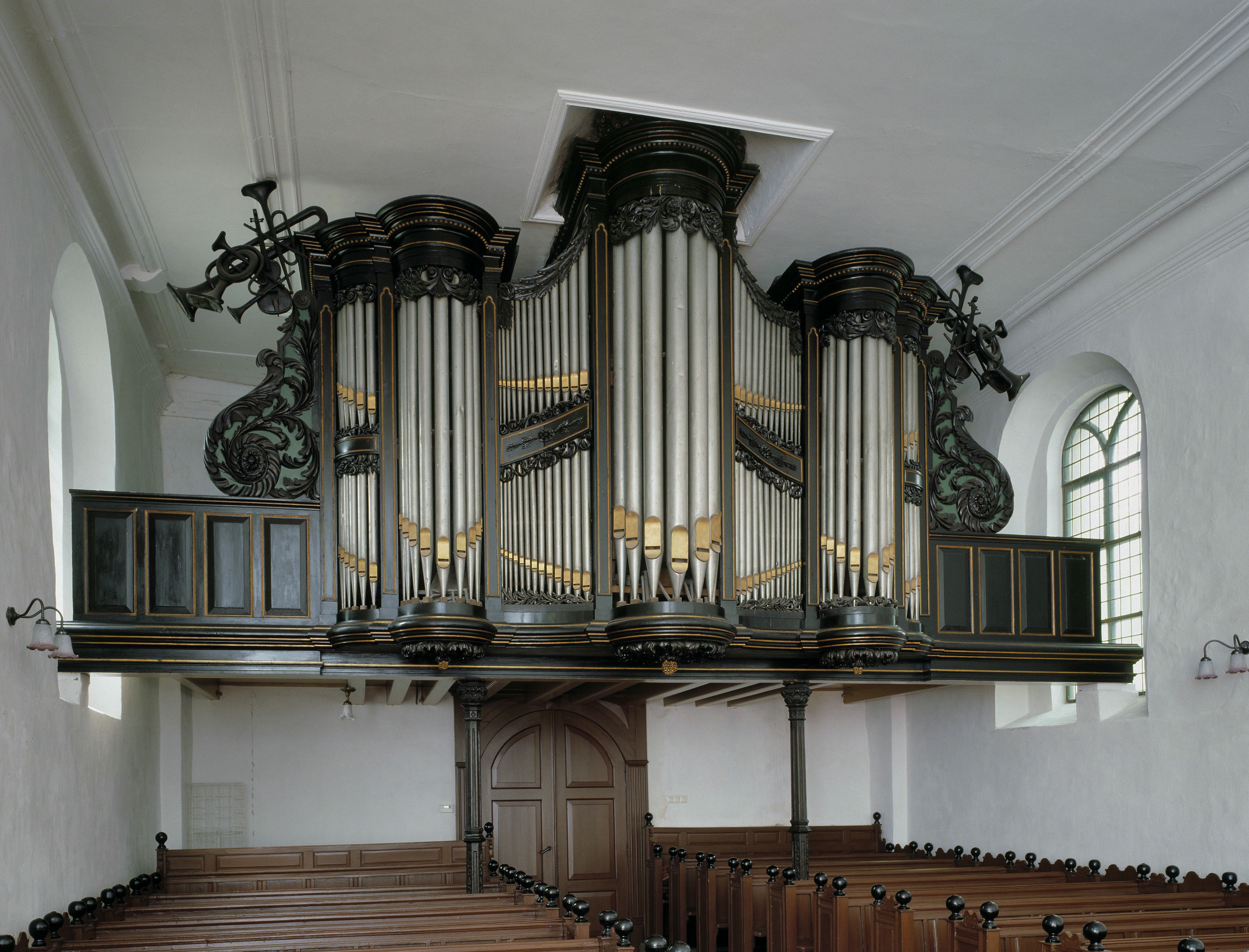 Nederlands Hervormde Kerk: Interieur, aanzicht orgel, orgelnummer 1087 (opmerking: Gefotografeerd voor Het Historische Orgel in Nederland 1858-1865)